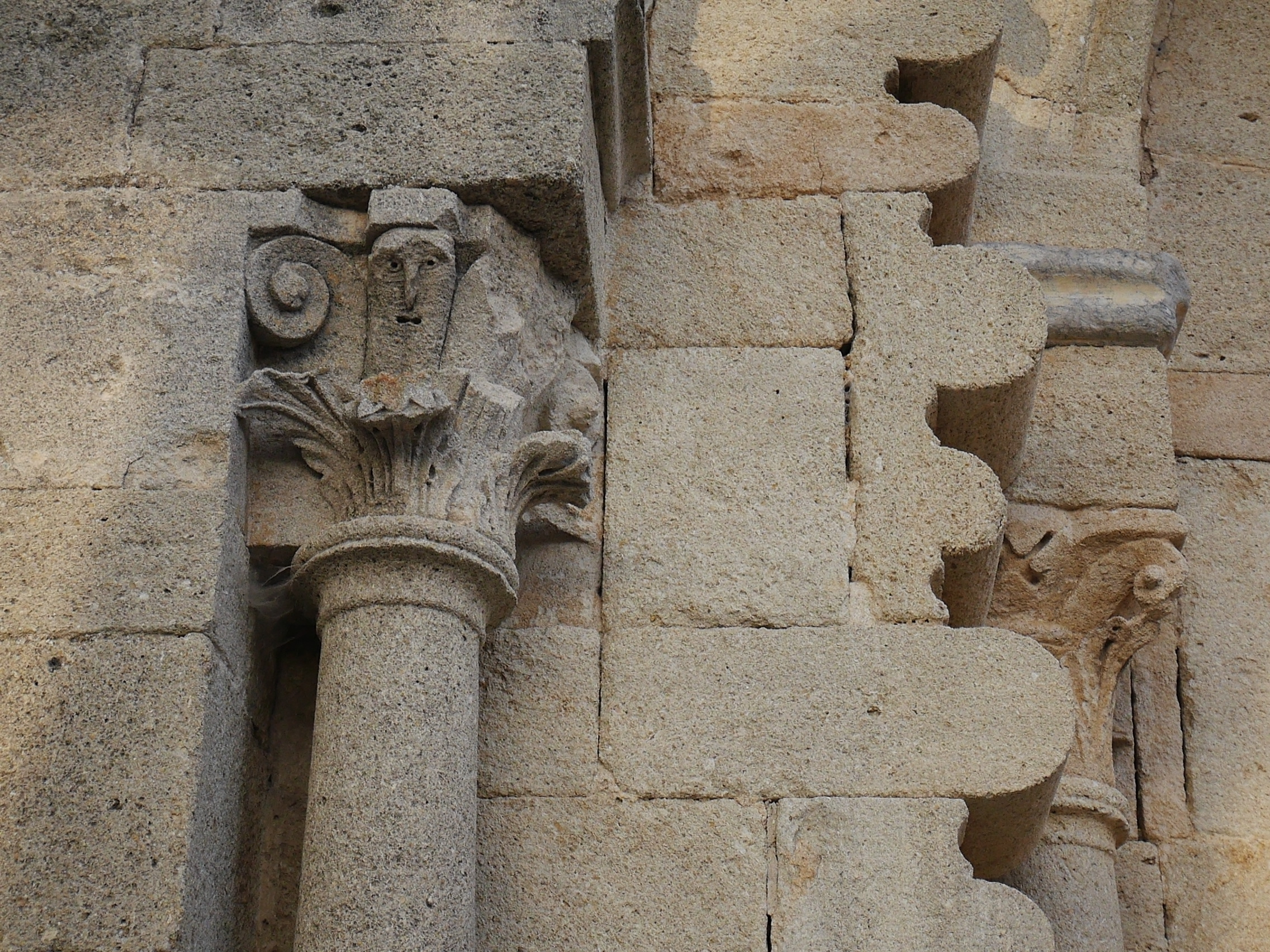 Extérieur du Prieuré de Ganagobie Kapitell Maske